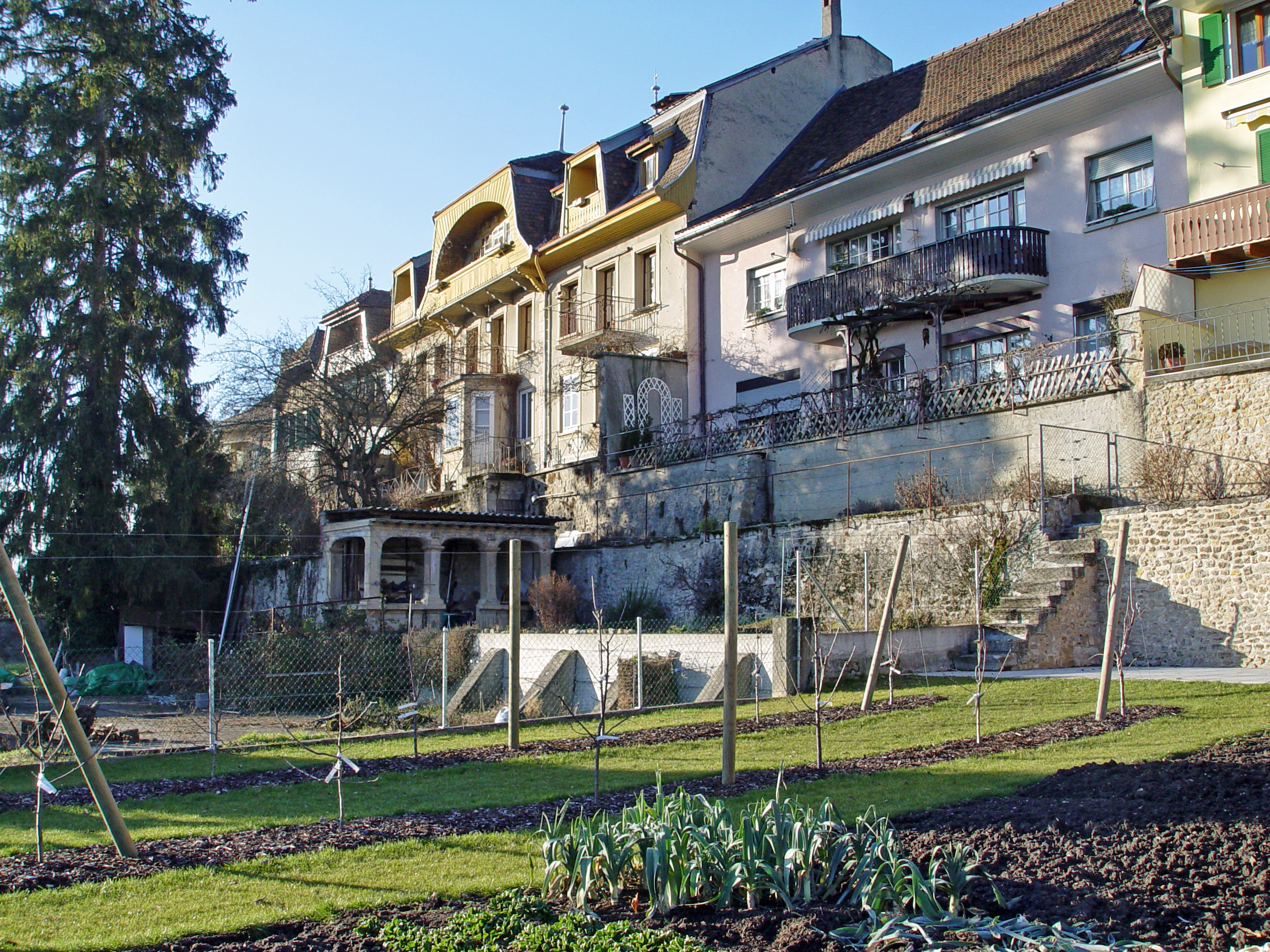 Avenches, Aussenseite der alten Ringmauer der Altstadt